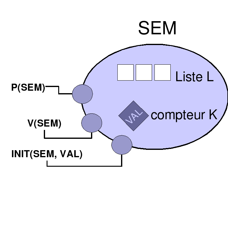 j'ai créé cette image grâce sur OpenOffice. --Pixeltoo 30 novembre 2005 à 19:03 (CET)